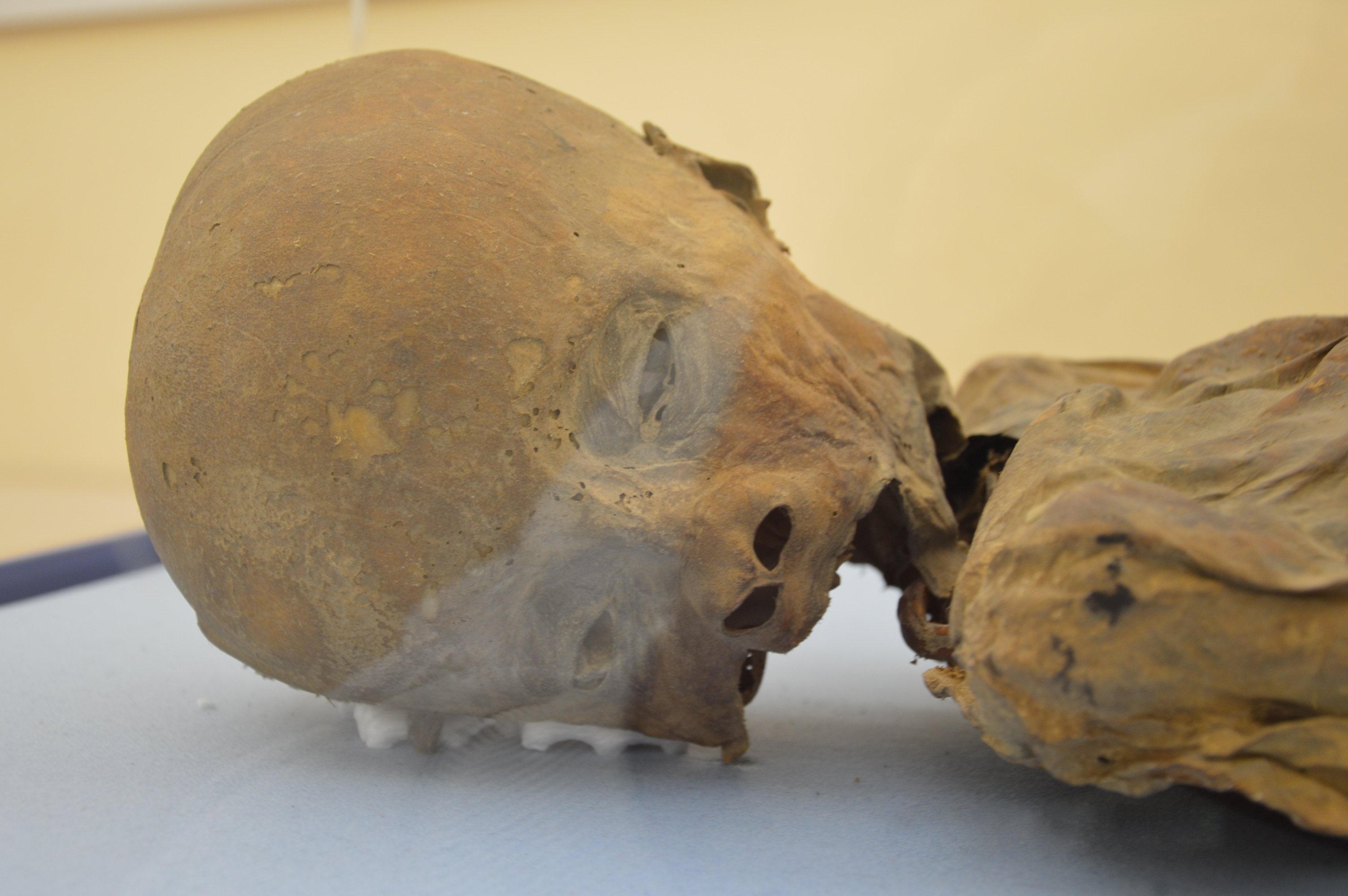 Reperto archeologico di un bambino